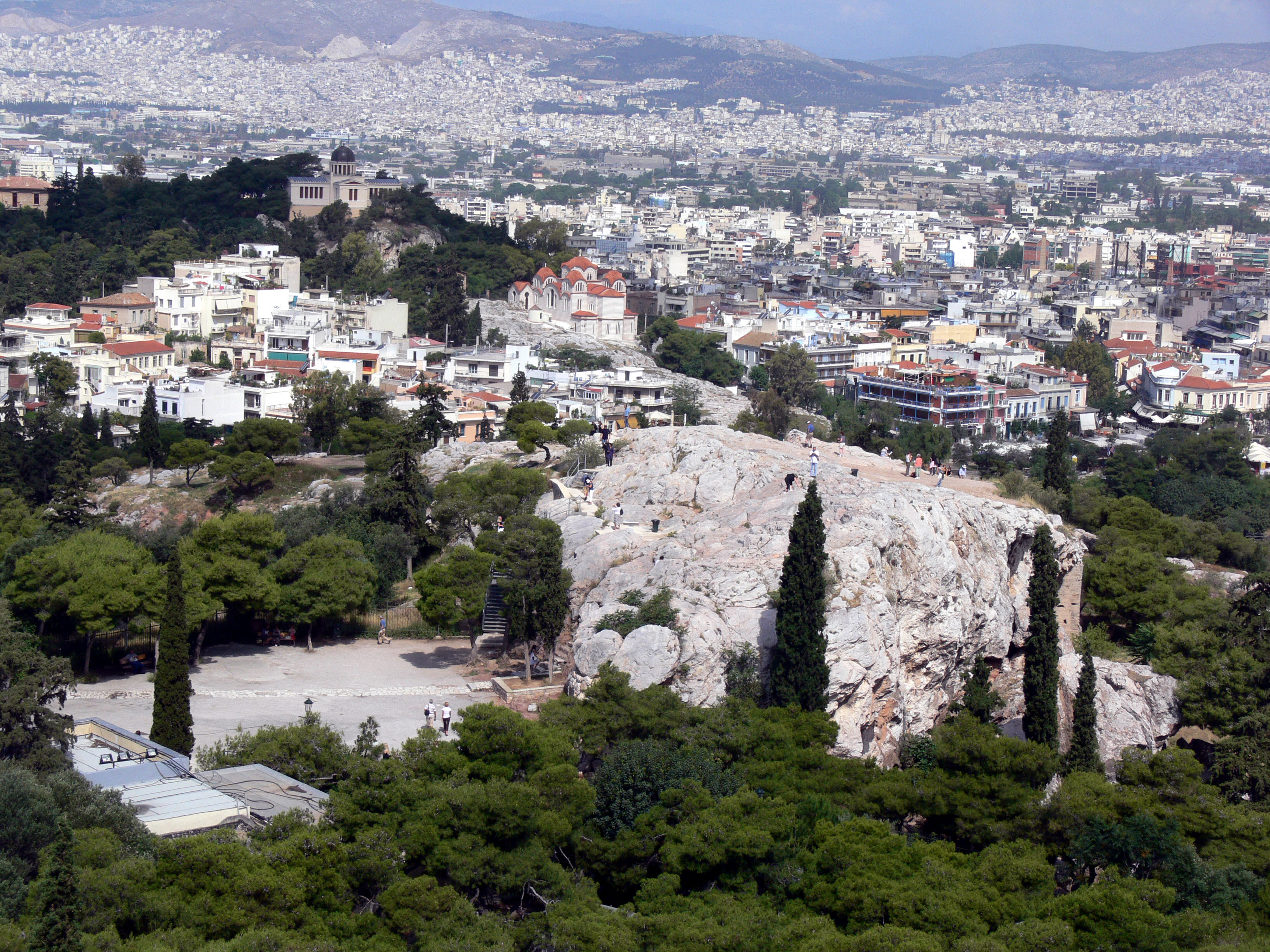 Blick auf den Areopag in Athen